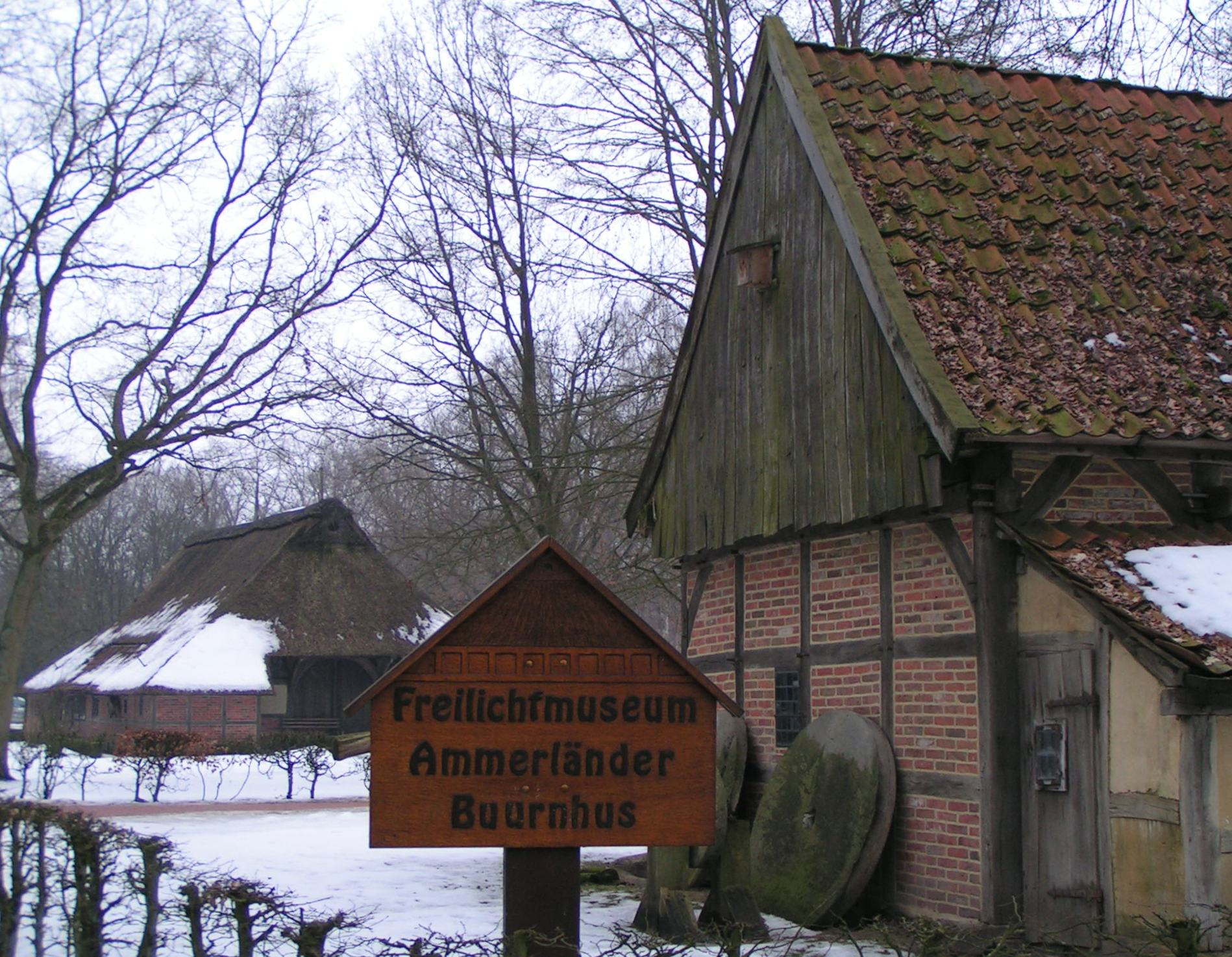 Freilichtmuseum Bad Zwischenahn